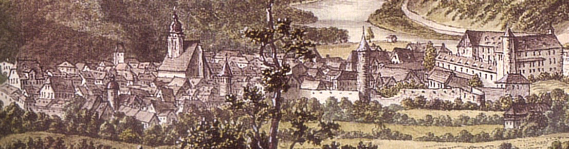 Stadtansicht von Münden